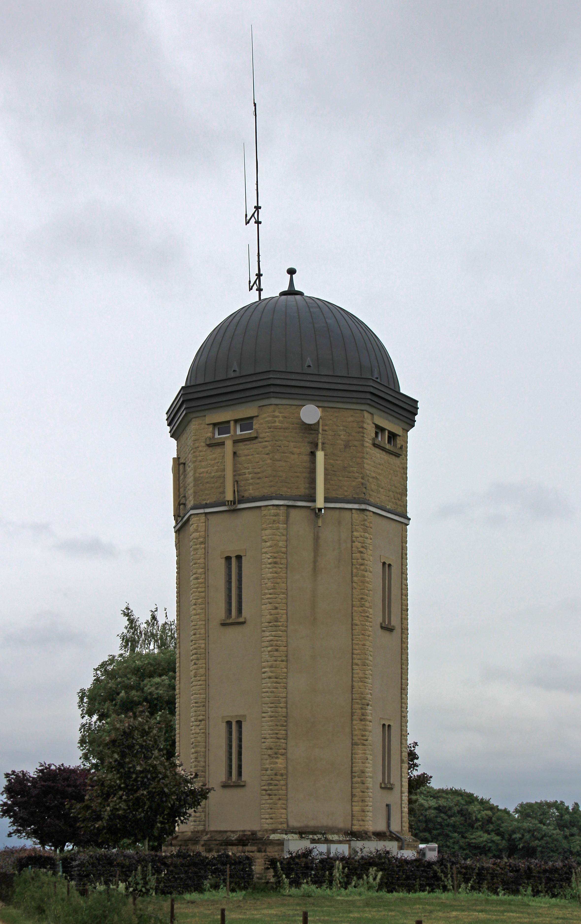 De Rippweiler Waassertuerm bei der Grotte